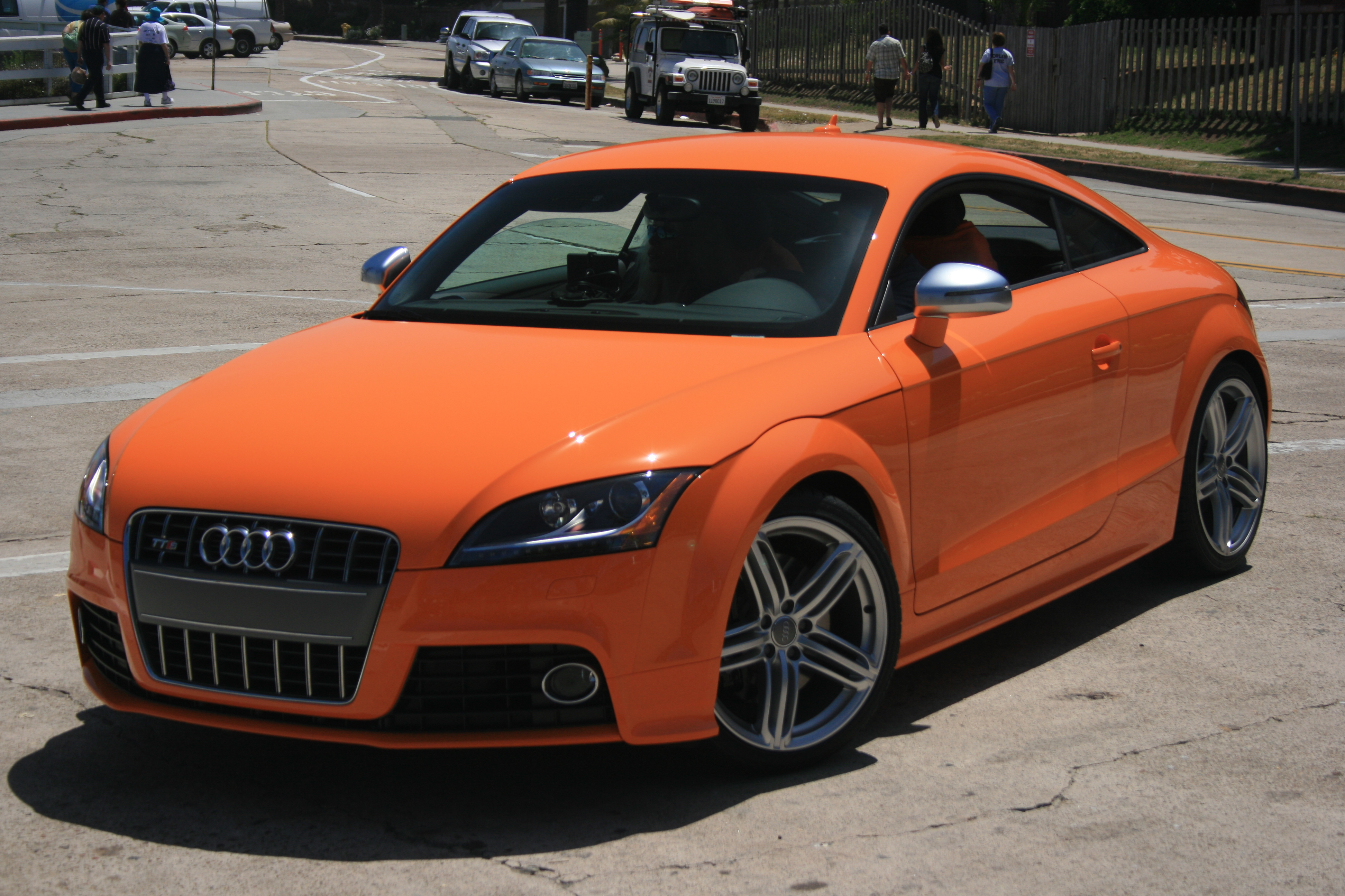 Seen in La Jolla, San Diego